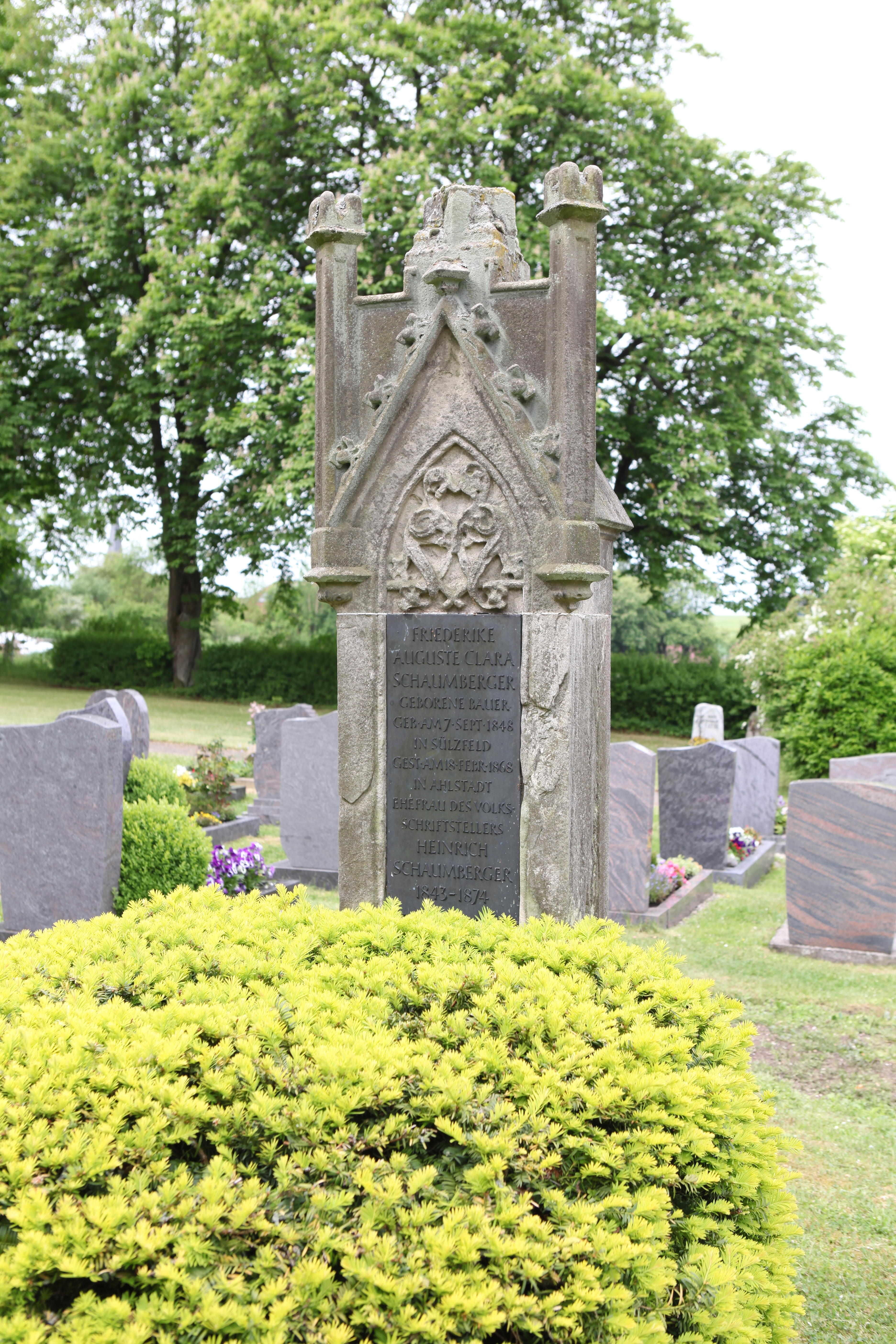 Ahlstadt, Grabmal Schaumberger